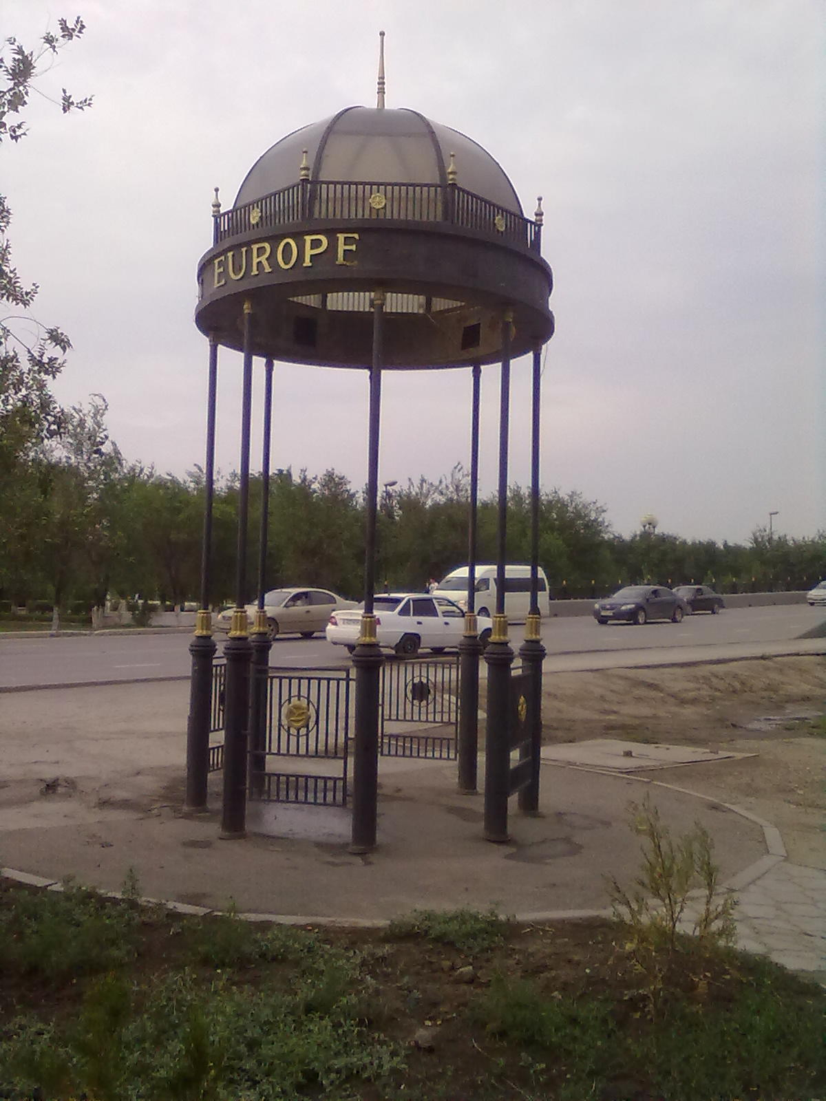 Il monumento indicante la riva europea del fiume Ural ad Atyrau, Kazakistan. The monument on the european bank of the Ural river in Atyrau, Kazakhstan.